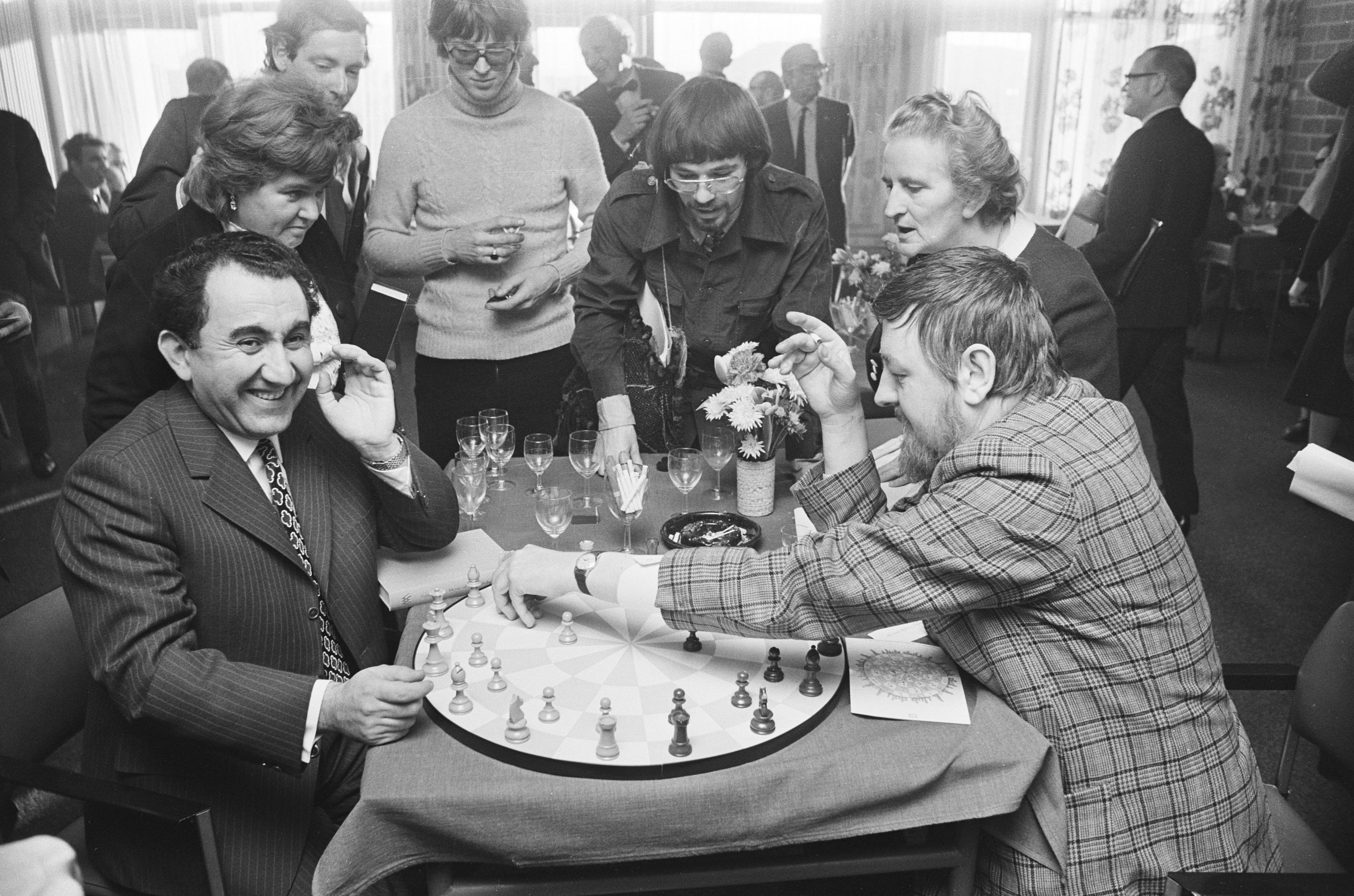 Collectie / Archief : Fotocollectie Anefo Reportage / Serie : [ onbekend ] Beschrijving : 33e Hoogovenschaaktoernooi , Wijk aan Zee ; Petrosian (links) en J. H. Donner schaken op rond bord Datum : 11 januari 1971 Locatie : Noord-Holland, Wijk aan Zee Trefwoorden : SCHAKEN Persoonsnaam : Donner, Jan Hein Fotograaf : Mieremet, Rob / Anefo Auteursrechthebbende : Nationaal Archief Materiaalsoort : Negatief (zwart/wit) Nummer archiefinventaris : bekijk toegang 2.24.01.05 Bestanddeelnummer : 924-1649